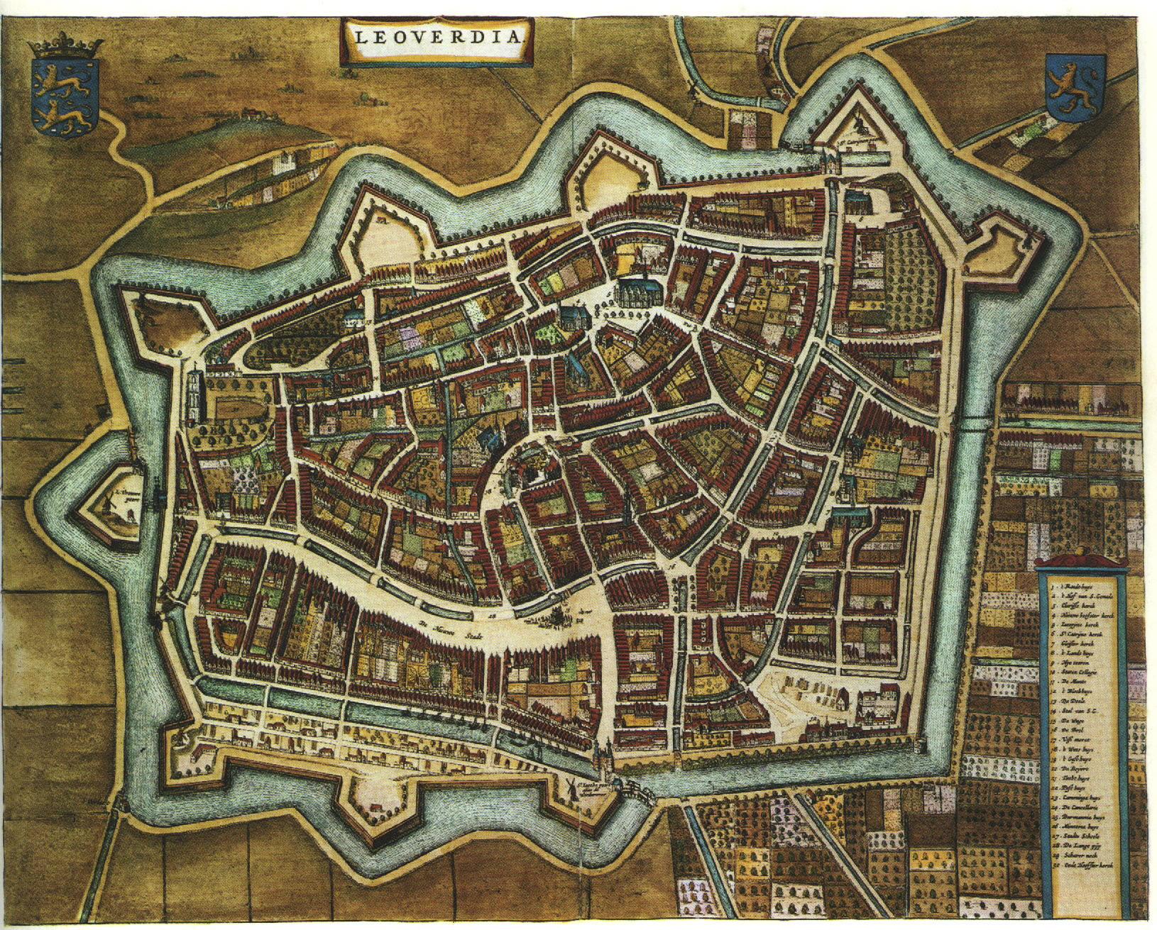 LEEUWARDEN Leoverdia. Copperplate from the "Steden-Boek" by J. Blaeu. Amsterdam, 1649. Contemporary handcoloured engraved print. Ca 40x50 cm.